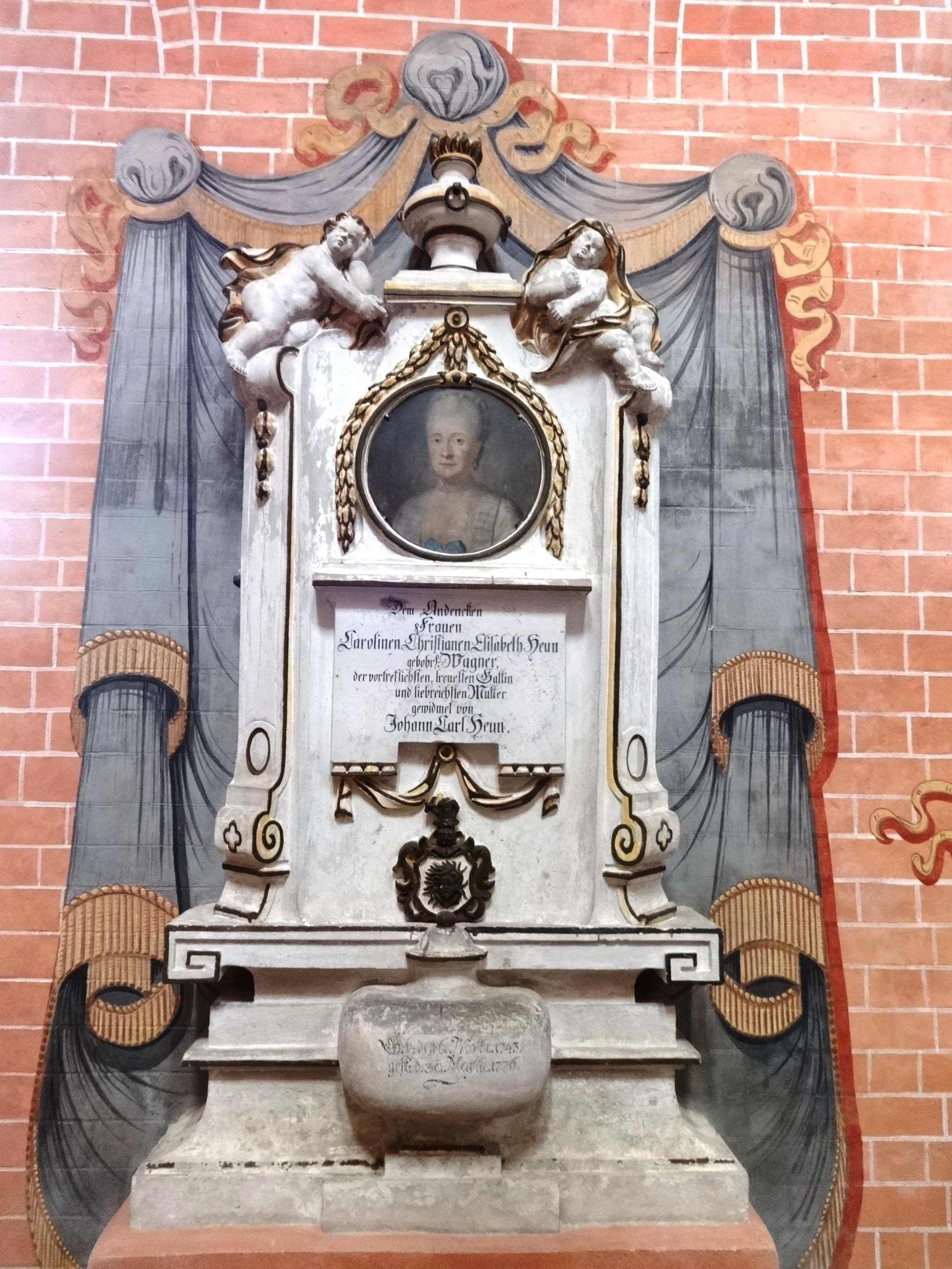 Die Klosterkirche in Doberlug gilt als das älteste erhaltene Gotteshaus der Zisterzienser im Osten Deutschlands. Sie wurde zwischen 1184 und 1228 erbaut und nach der Reformation zu einer Schlosskirche umgebaut. Mitte des 19. Jahrhunderts wurde das Mobiliar wieder entfernt und unter der Leitung des Architekten Carl Weber in den Jahren 1905 bis 1909 umgebaut. Elisabeth Heun ist die Mutter von Heinrich Clauren [ (Lausitzer Rundschau)